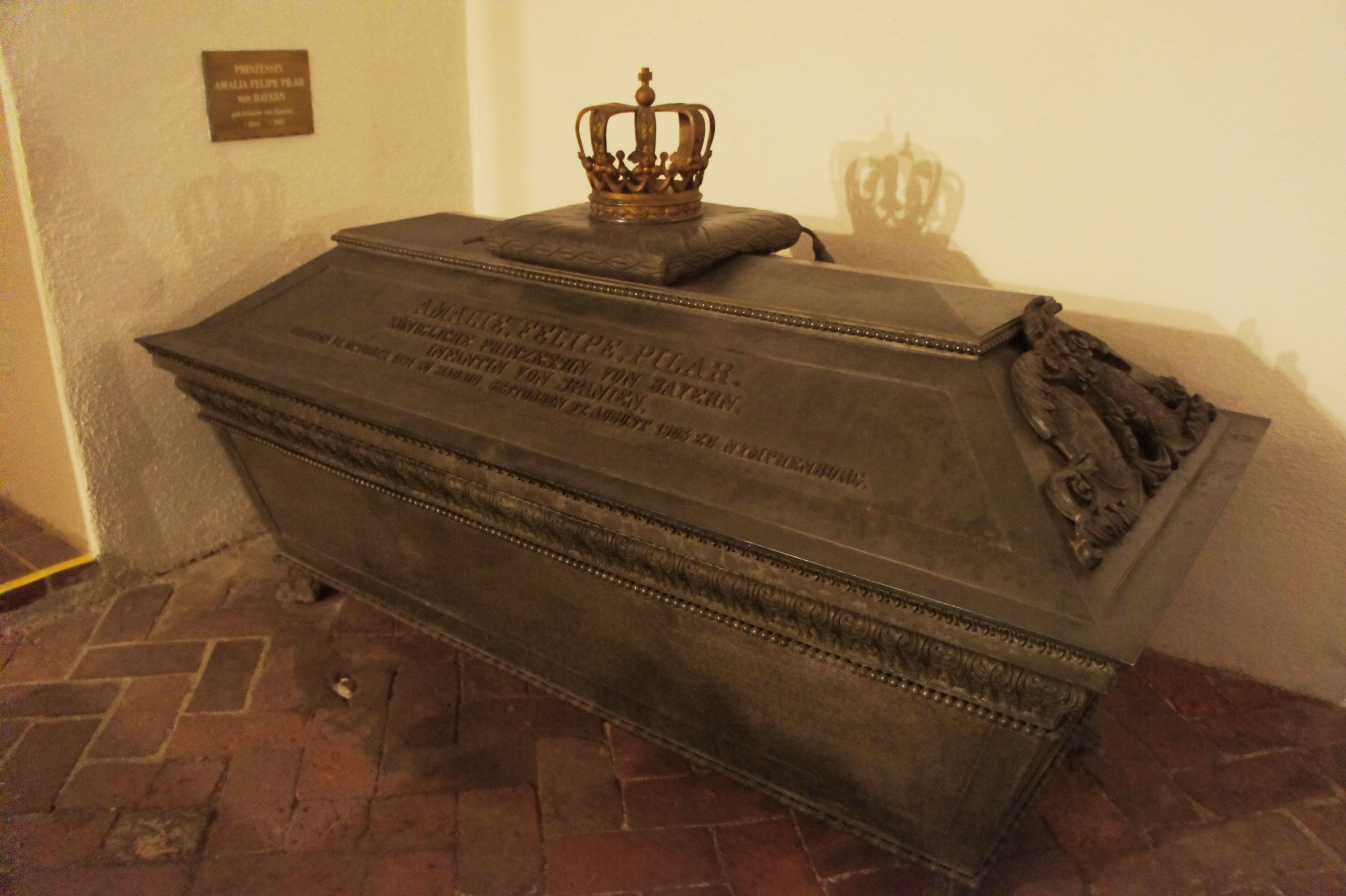 Prinzessin Amalia Pilar von Spanien (12. Oktober 1834 – 27. August 1905) (Gemahlin von Prinz Adalbert Wilhelm). Sarkophag in der Grablege der Wittelsbacher in der St. Michael Kirche in München.